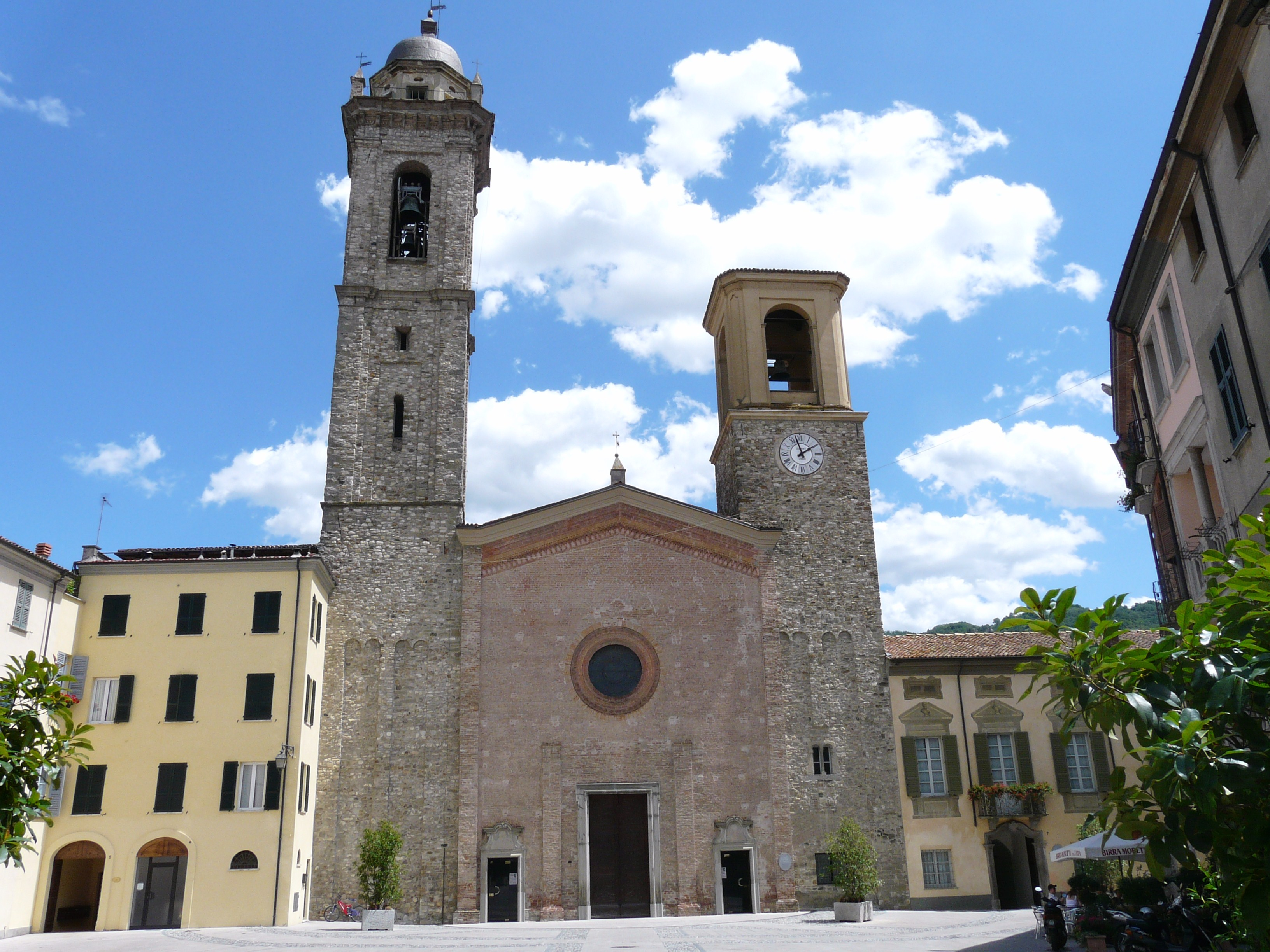 Immagini del duomo di Bobbio, Emilia-Romagna, Italia